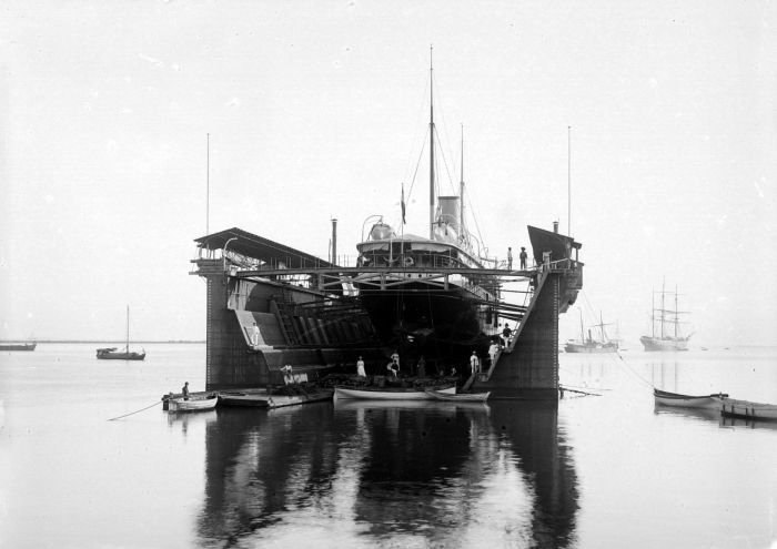 Repronegatief. In de tijd van de grote houten VOC-zeilschepen was de centrale reparatiewerf van Indië op het eiland Onrust, voor de kust bij Batavia gevestigd. Scheepsbouw vond daar niet plaats. De grotere schepen werden in Nederland gebouwd, de kleinere vooral te Rembang. Met de komst van de stoomschepen, ongeveer vanaf 1860, waren de voorzieningen op Onrust niet langer adequaat. De toen moderne haven van Tandjong Priok kreeg ook geavanceerde faciliteiten voor de reparatie van grote metalen stoomschepen. (P. Boomgaard, 2001). Dit is het 3.000-tons drijvend dok van Onrust gehuurd van de marine te Tandjong Priok. In 1896 werd een nieuw 4.000 tons droogdok in Tandjong Priok in gebruik gesteld.